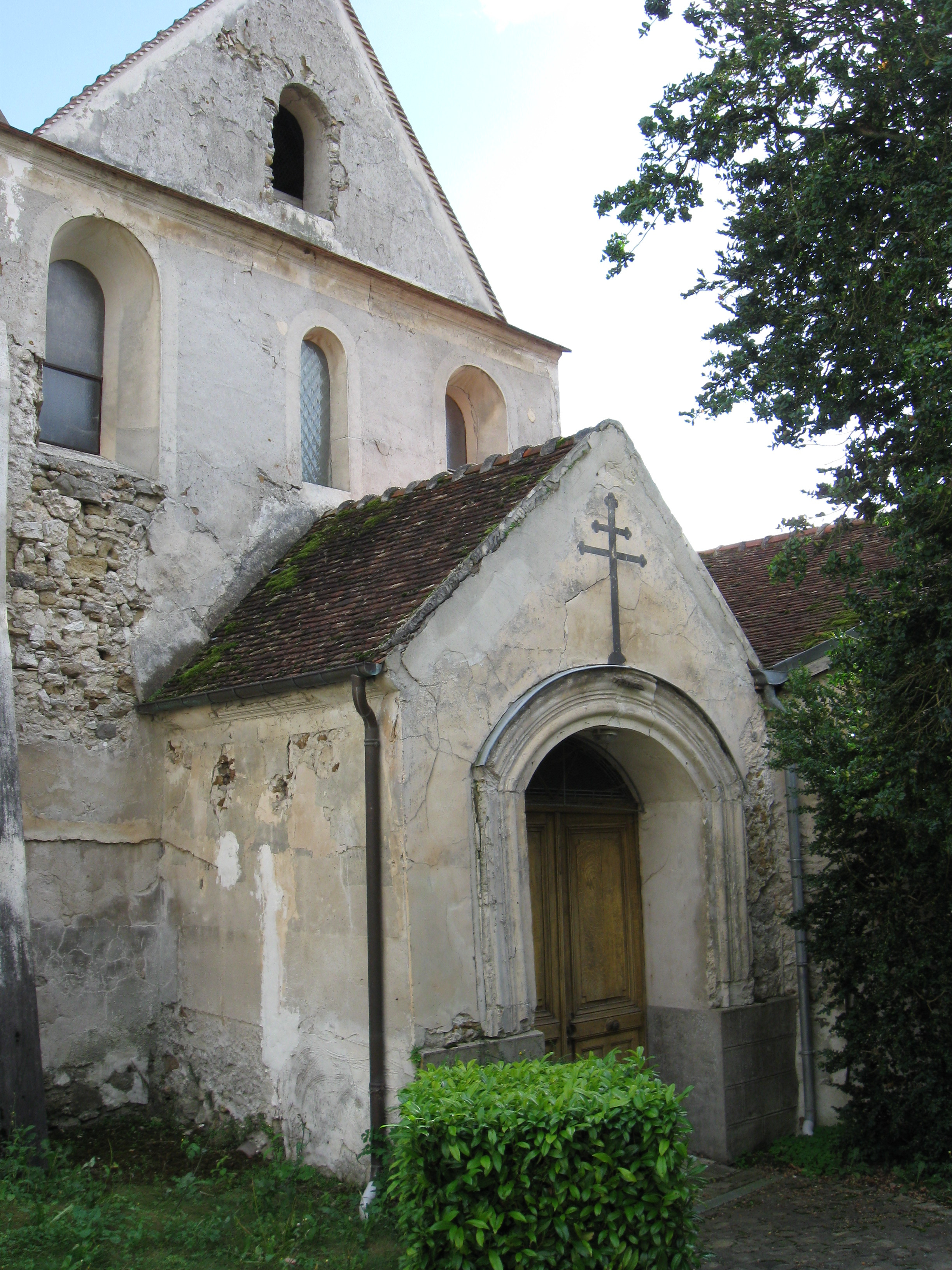 Porche de l'église Saint-Quiriace de Crouttes-sur-Marne. (département de l'Aisne , région Picardie).